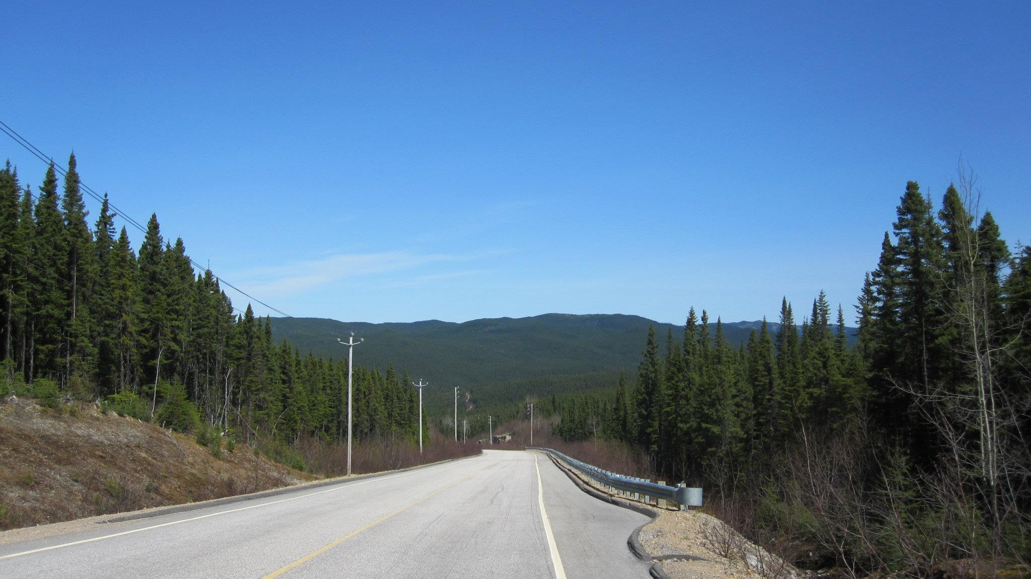 Le chemin de la SM3